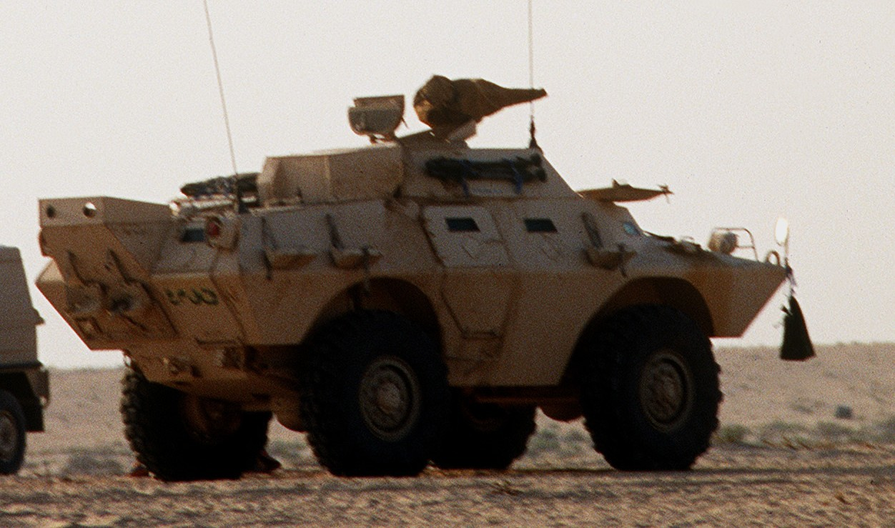 A Saudi V-150 Commando. Cropped from Pinzgauer V-150 Commando.jpg